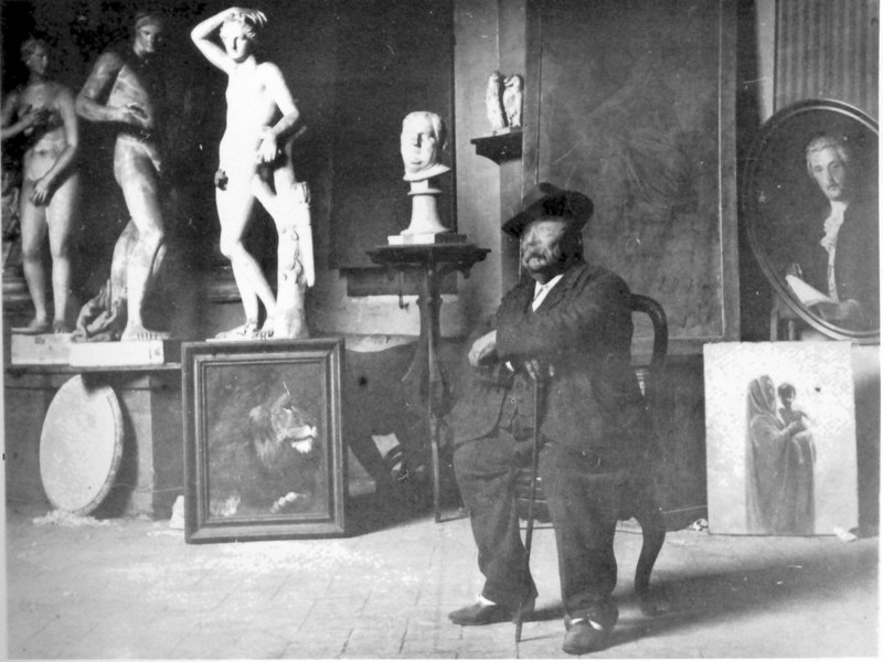 Template:Antonio Berti, 1906